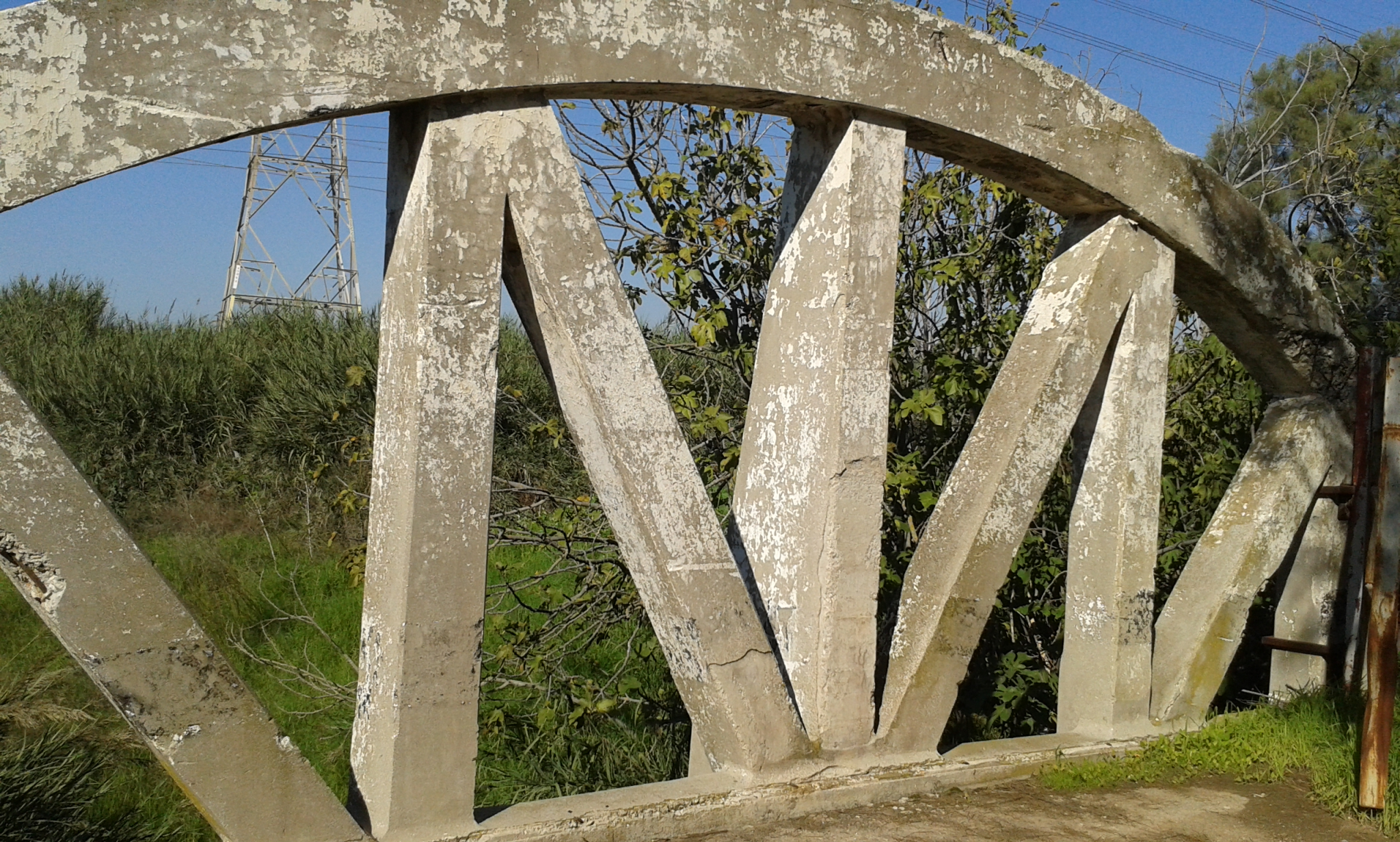 גשר הקשתות מעל נחל לכיש